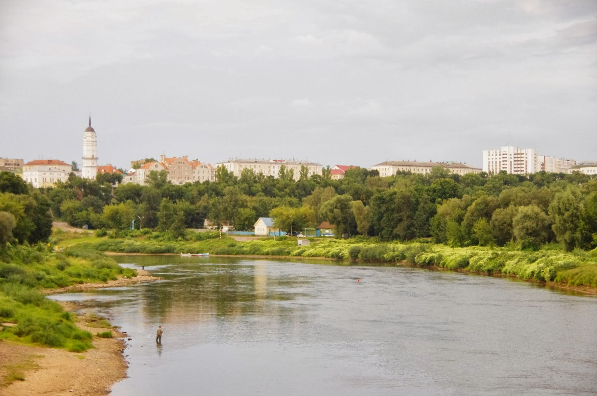 Lieninski District, Mogilev, Belarus